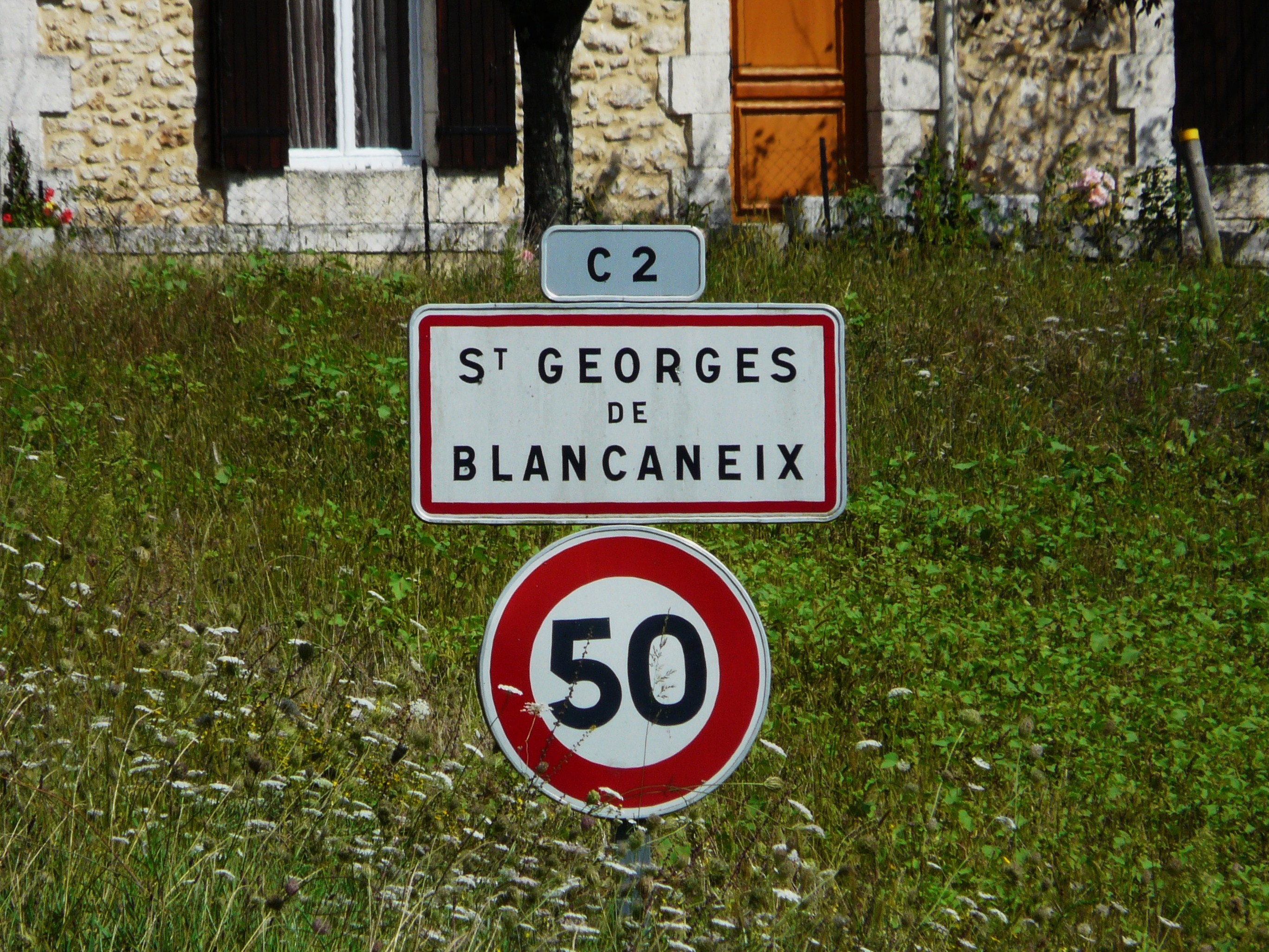 Panneau d'entrée dans le village de Saint-Georges-Blancaneix, Dordogne, France.